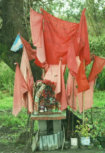 Shrine to Gauchito Gil in Santiago del Estero Province